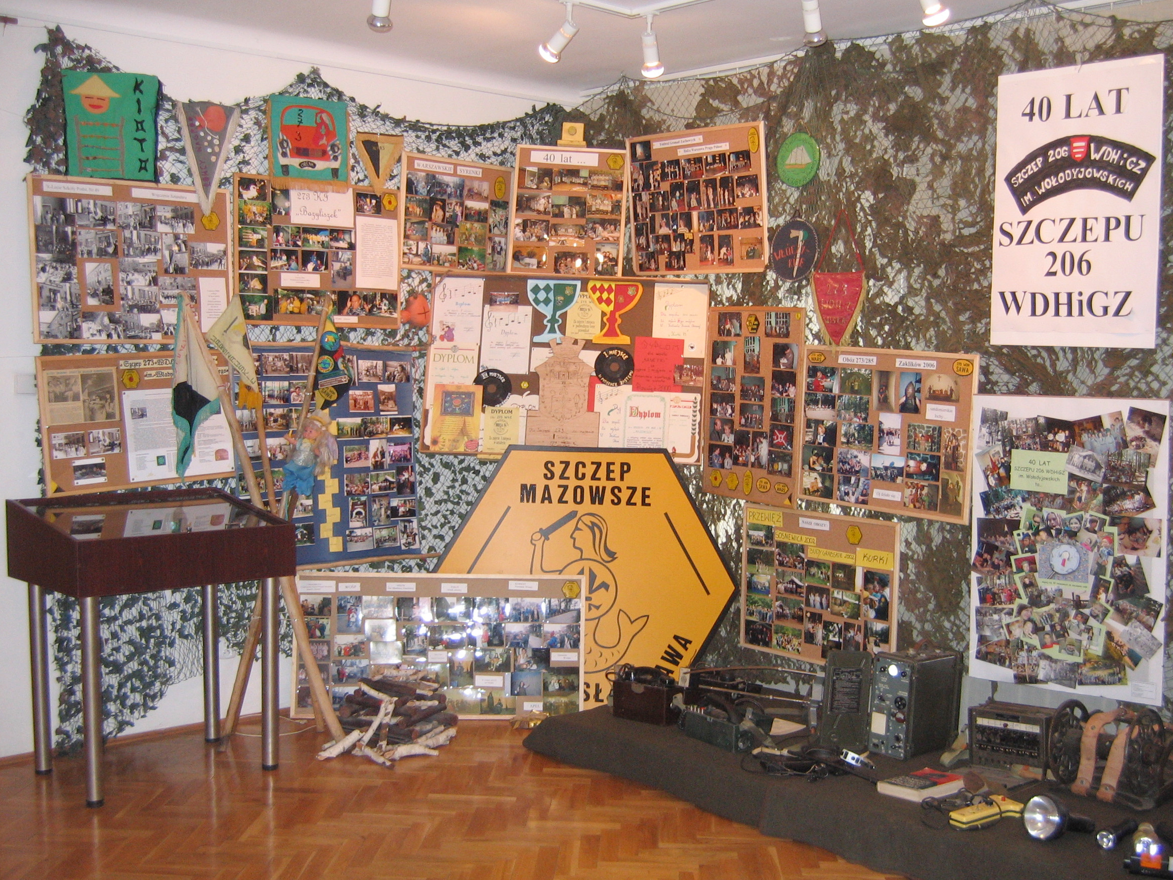 Wystawa pamiątek harcerskich hufca w Domu Kultury Praga